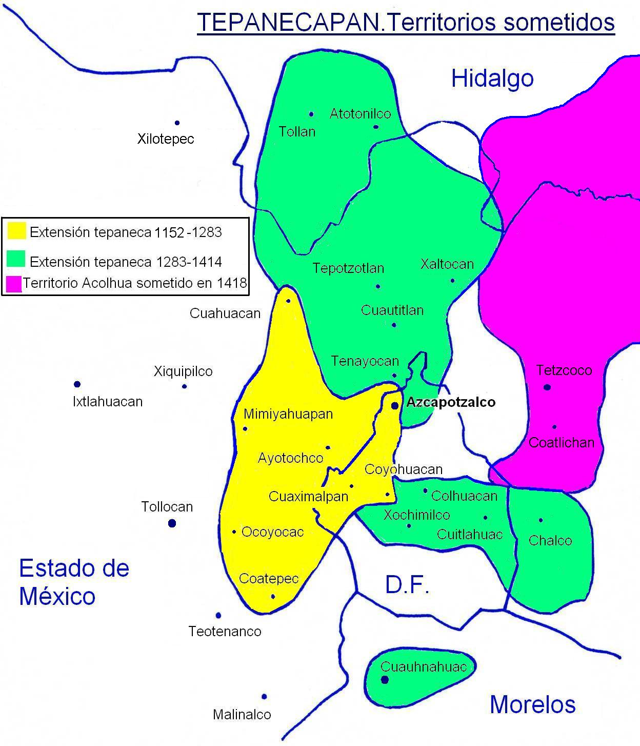 Extensión del señorio Tepaneca de 1152 a 1431.